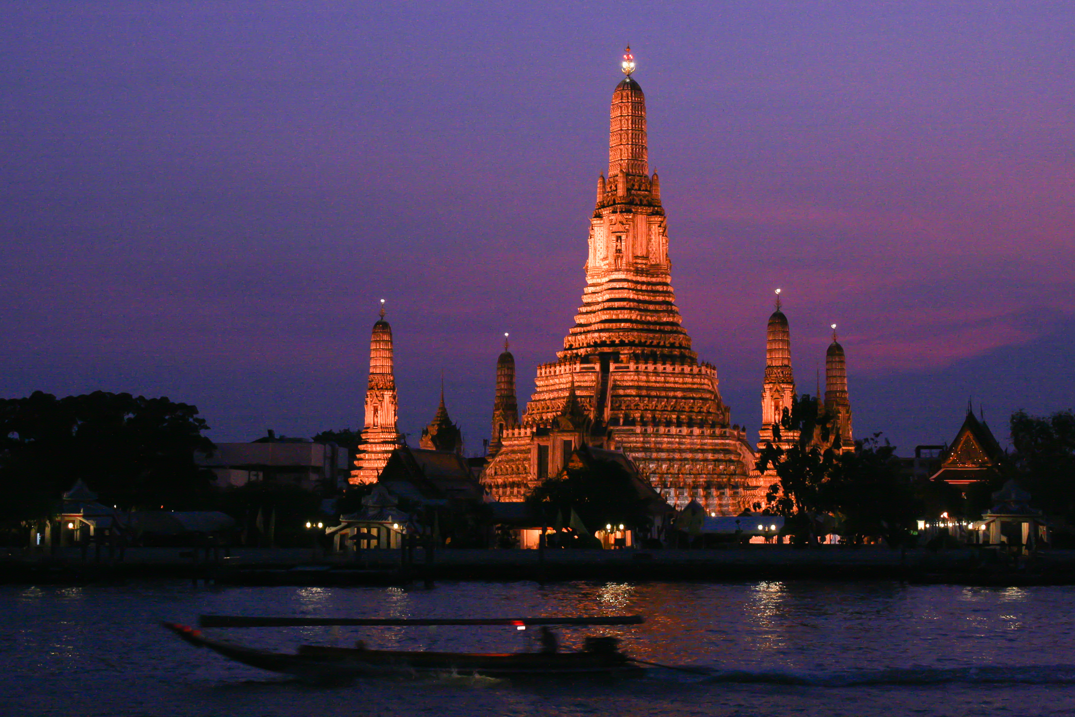 วัดอรุณราชวราราม